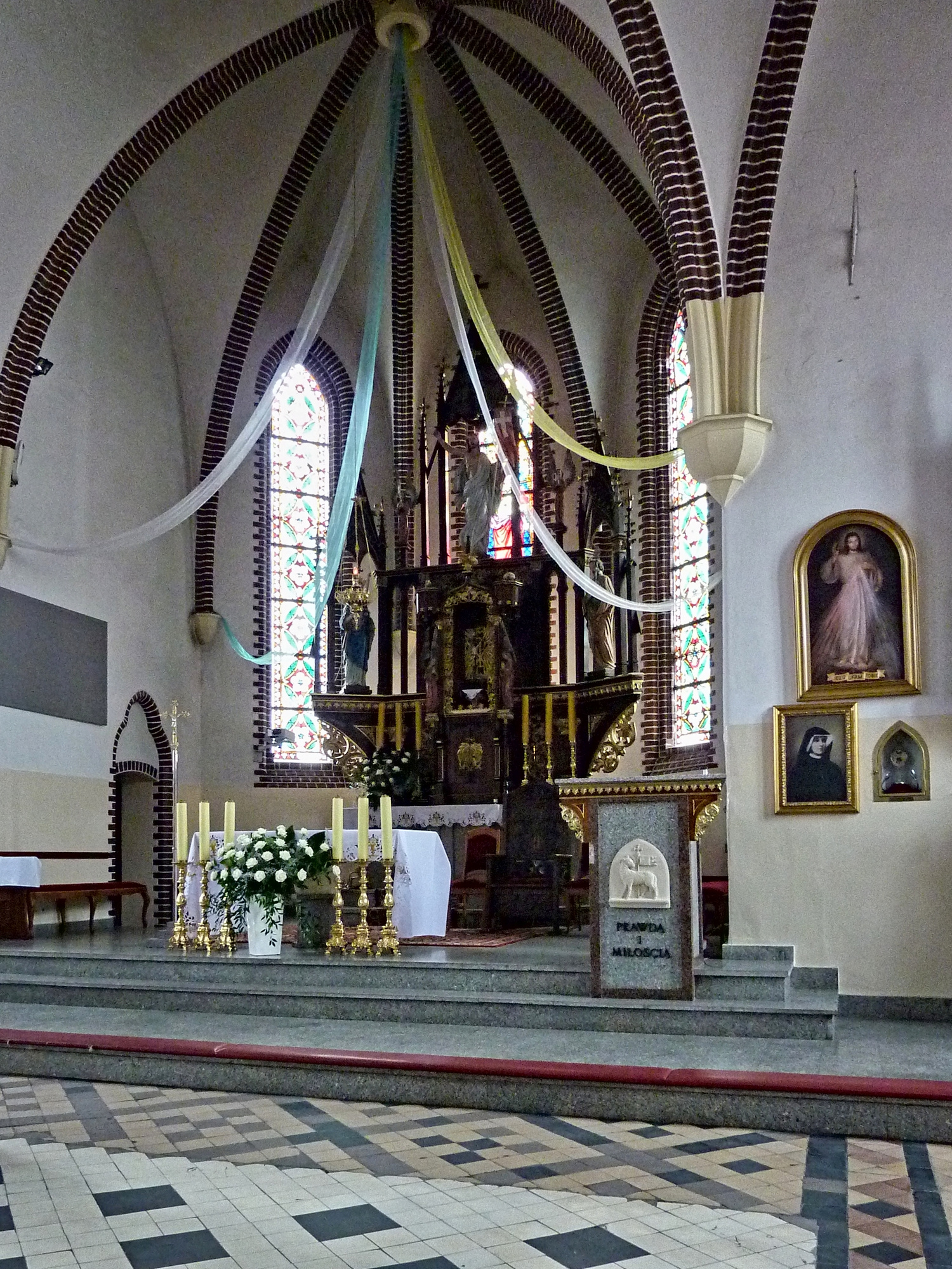 XIX-wieczny kościół Zmartwychwstańców w Kościerzynie, dawniej ewangelicki - ołtarz.